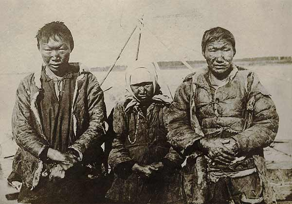 Типы прокаженных якутов Вилюйской колонии (Якутская область). № 247.